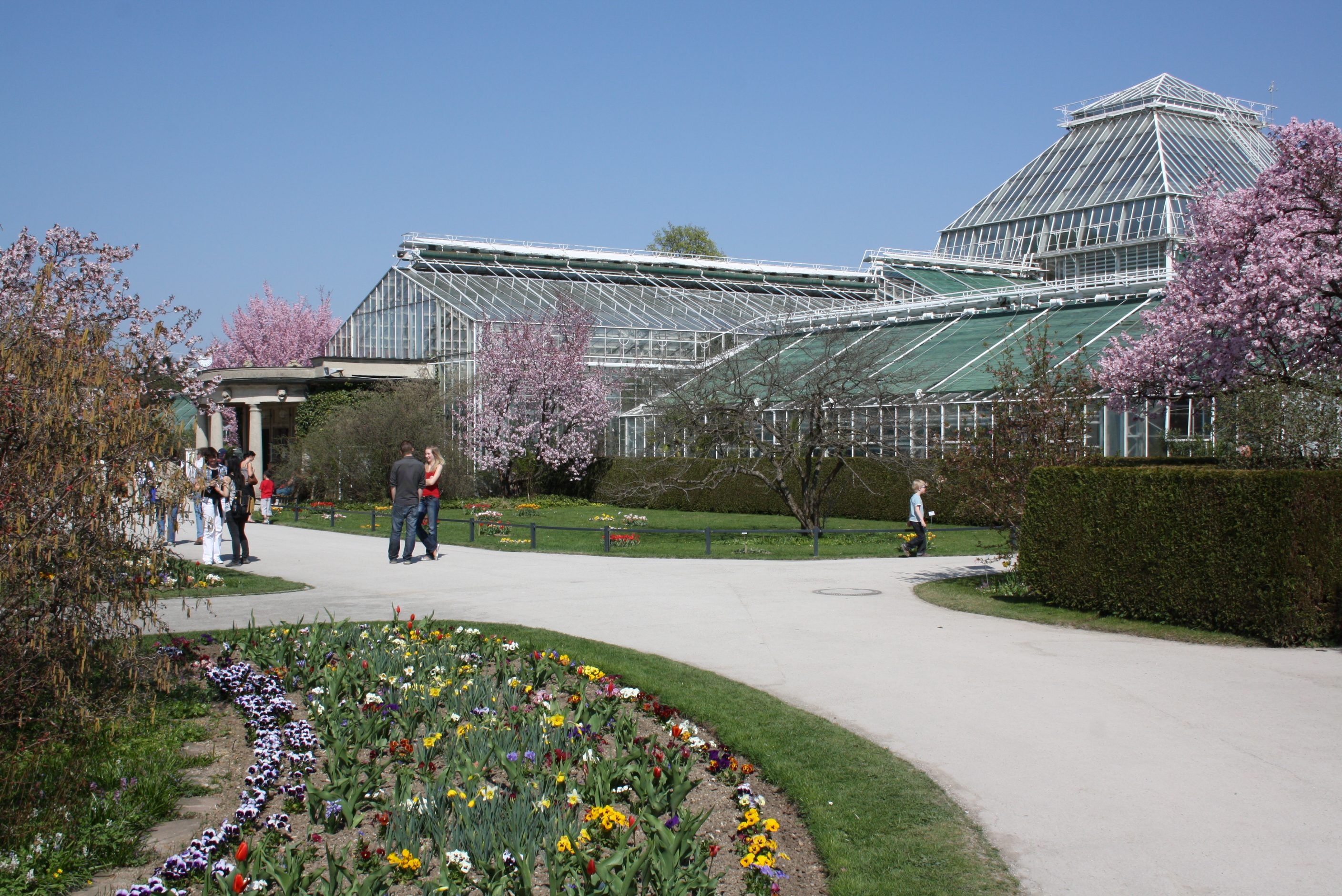 Blick auf die Gewächshäuser des Botanischen Gartens in München